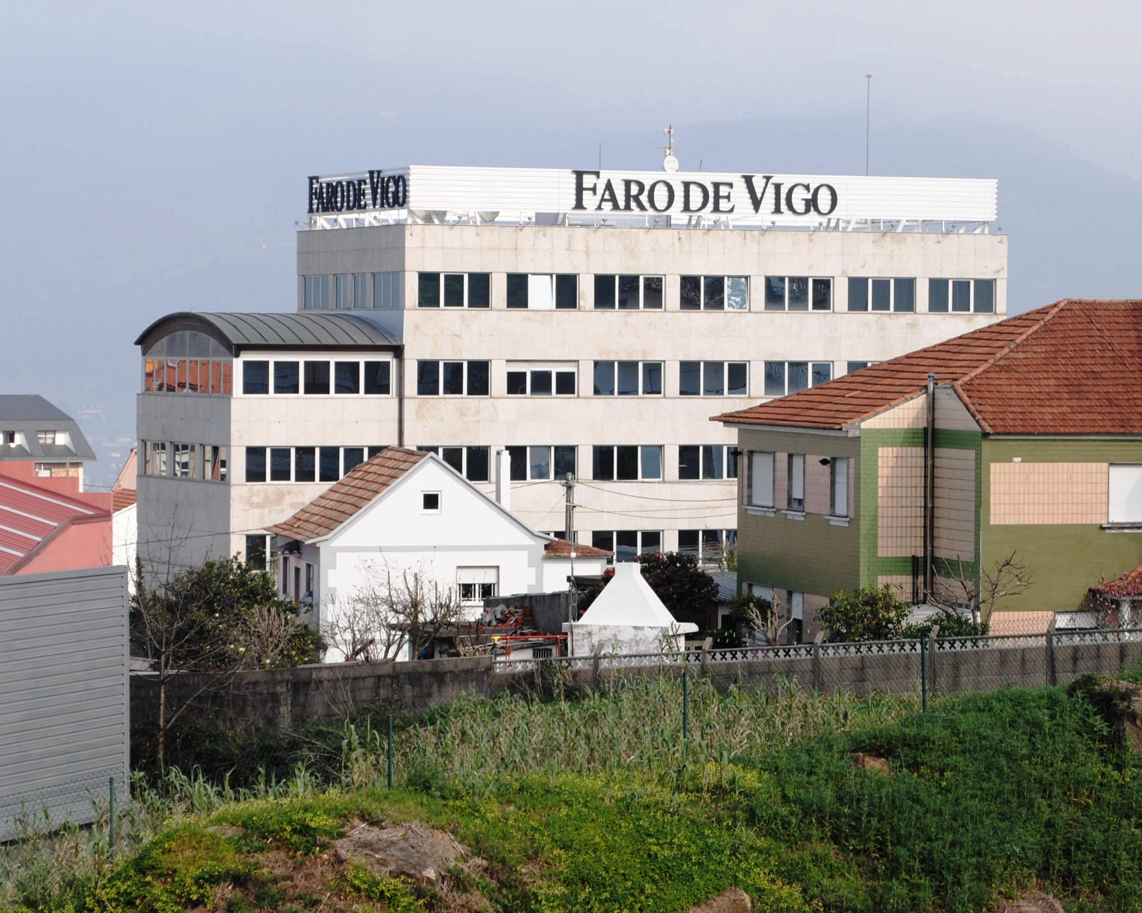 Vexa o título e as categorías